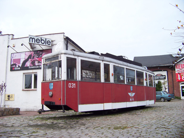 Legnicki tramwaj